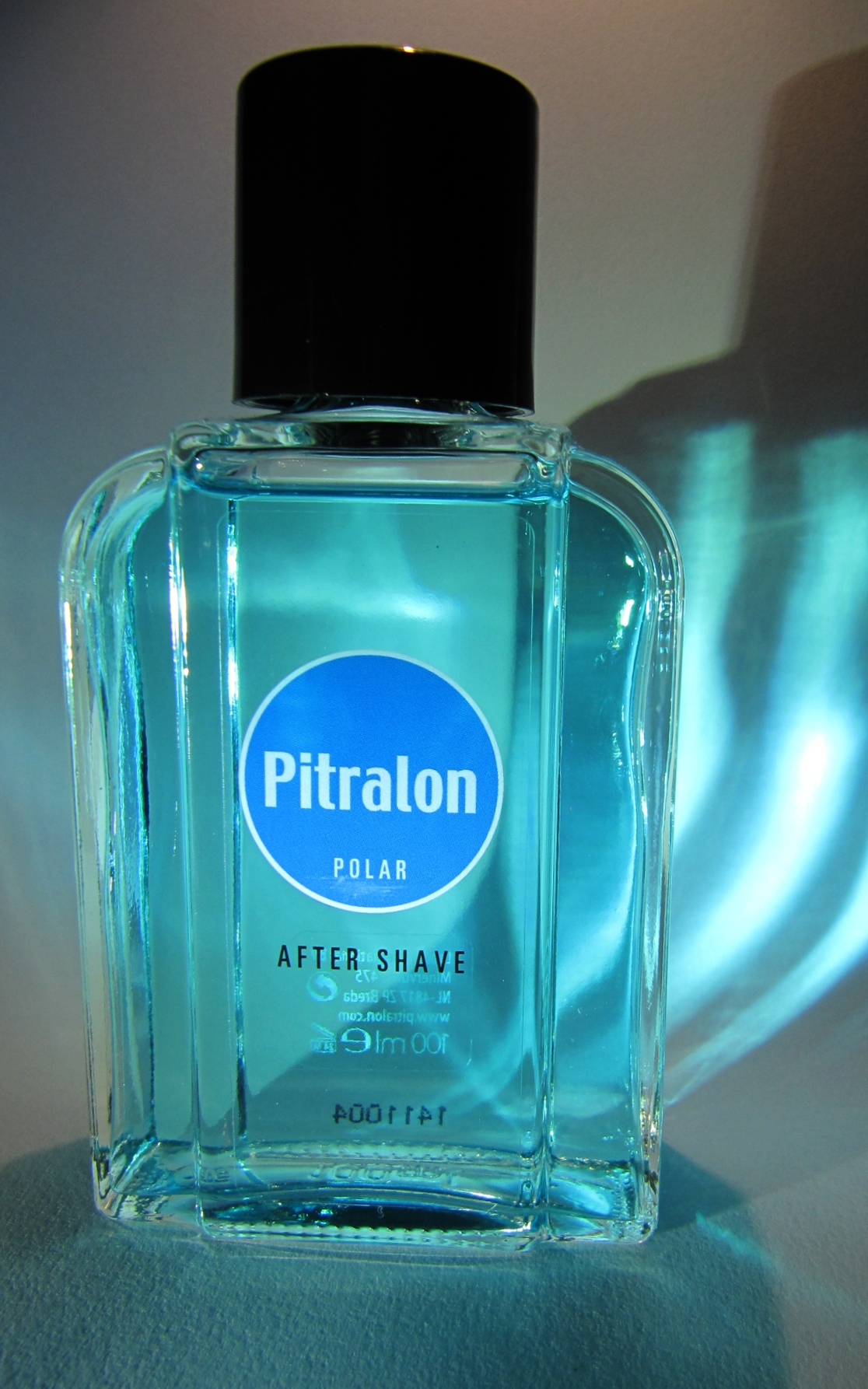 Pitralon "Polar" (1)